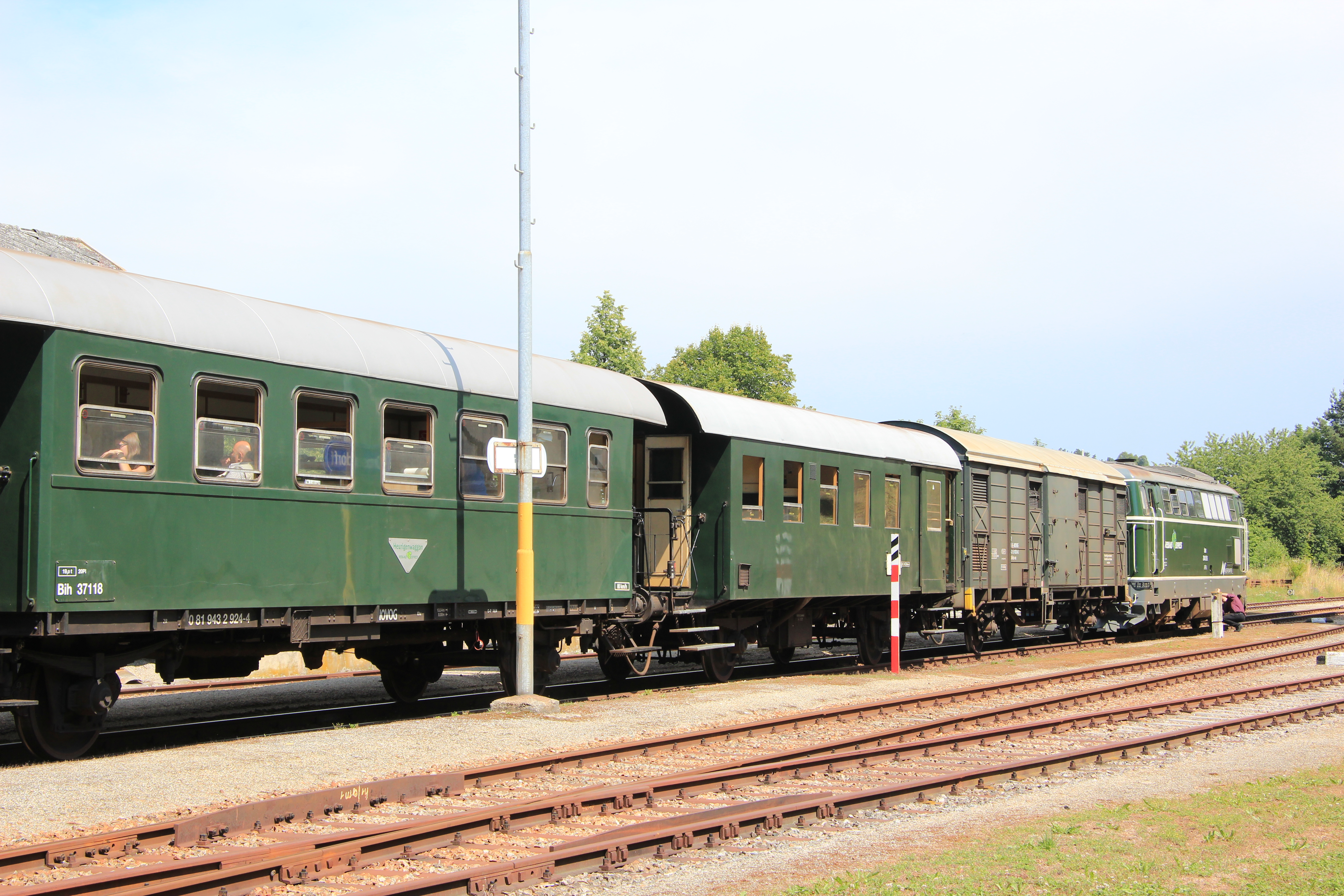 Reblaus-Express am Bahnhof Drosendorf